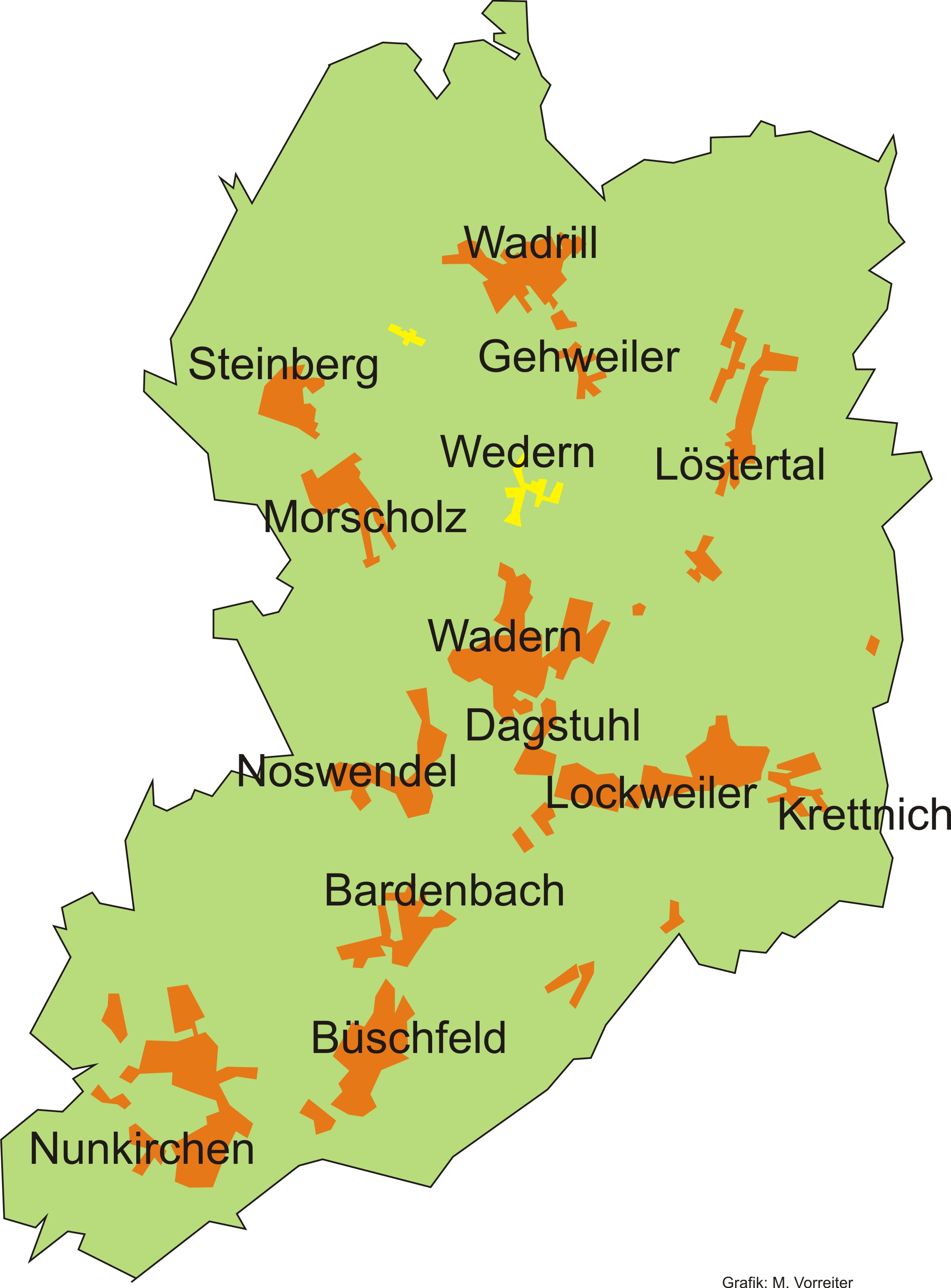 Lage des Stadtteils Wedern im Stadtgebiet